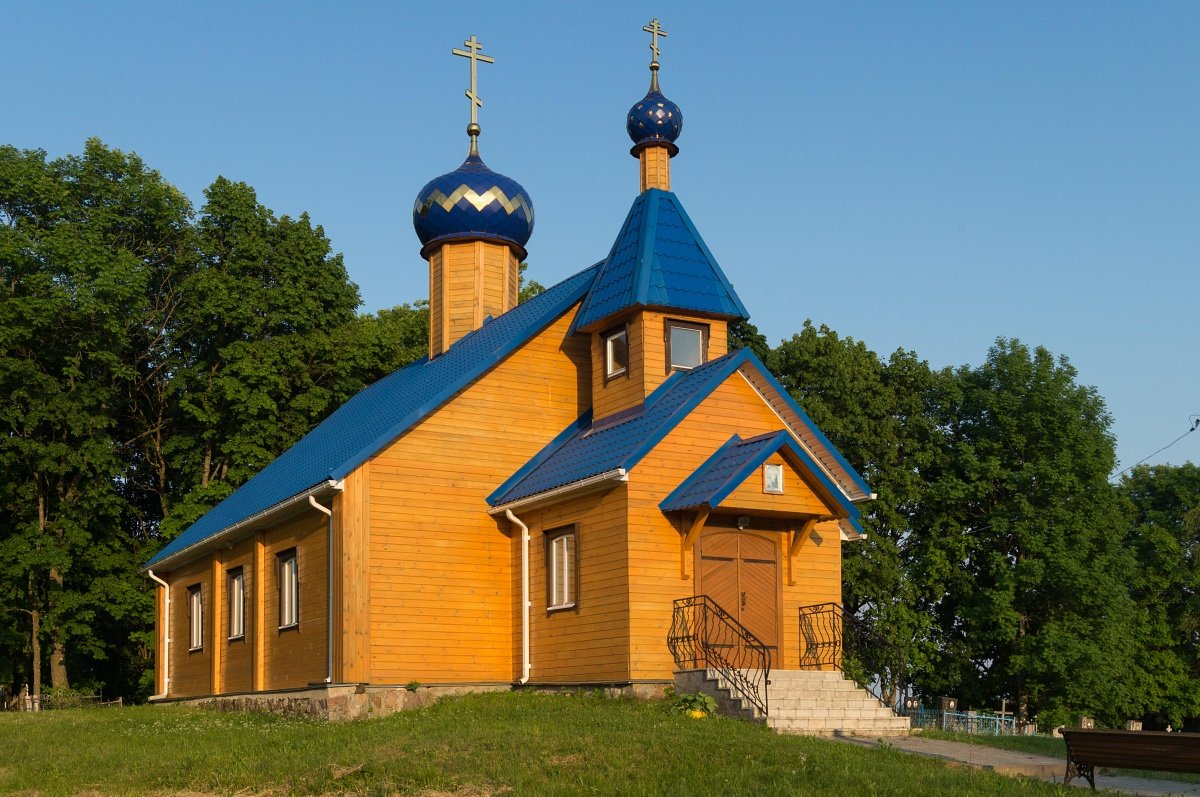 Спягла. Царква